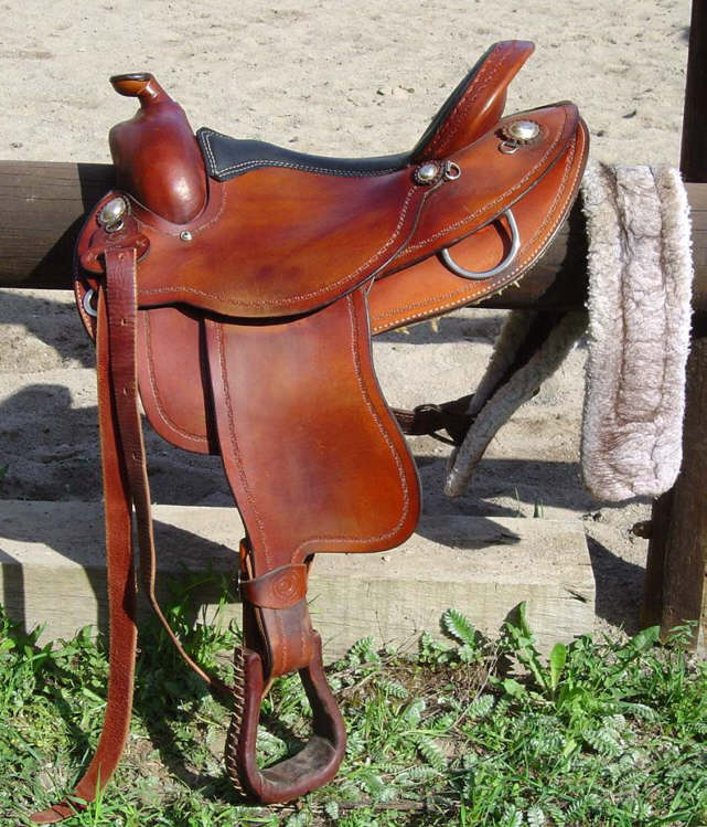 Westernsattel